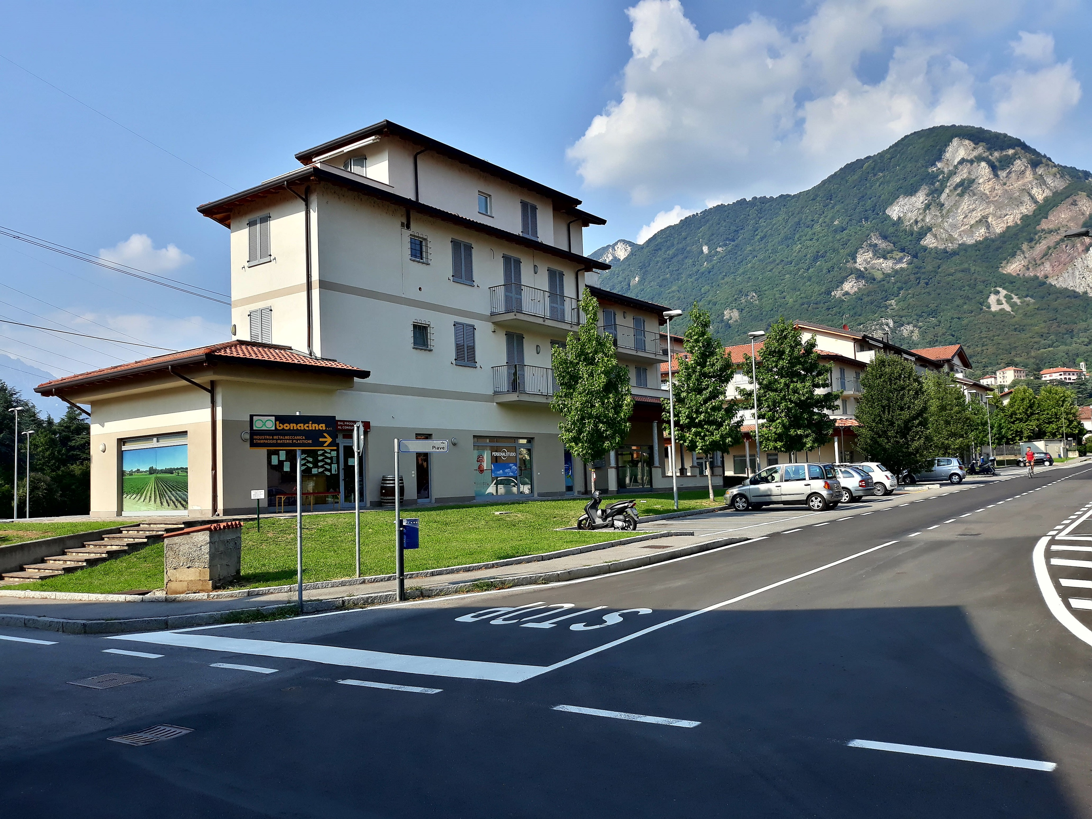 Nuovo complesso residenziale sorto su ex area Pirelli